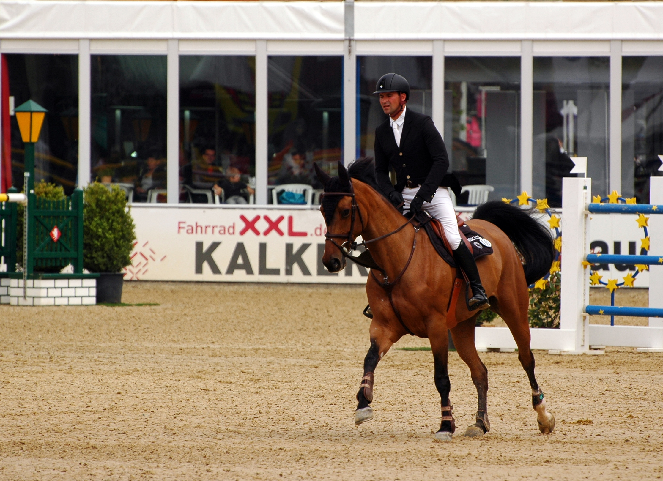 52. Maimarkt-Turnier, Romain Duguet auf Sherazade du Gevaudan